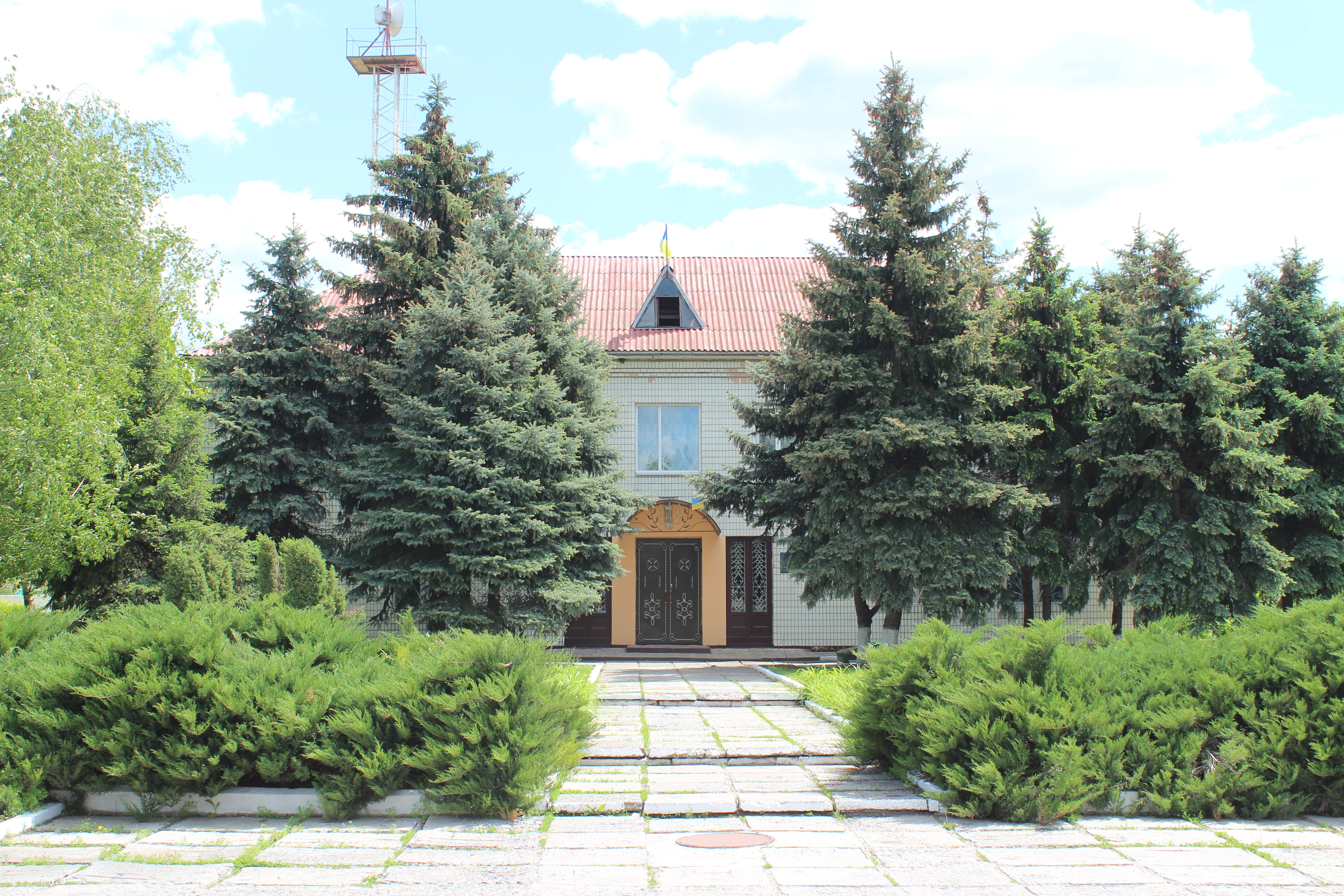 Перещепинська міська рада